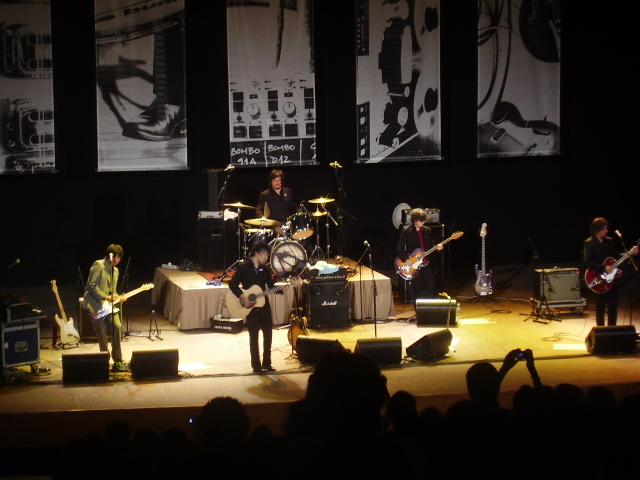 Los Bunkers en pleno cuando tocaron en el Teatro Regional de Talca el 5 de Febrero del 2006. Fotografía tomada por Ruben Palacios A.